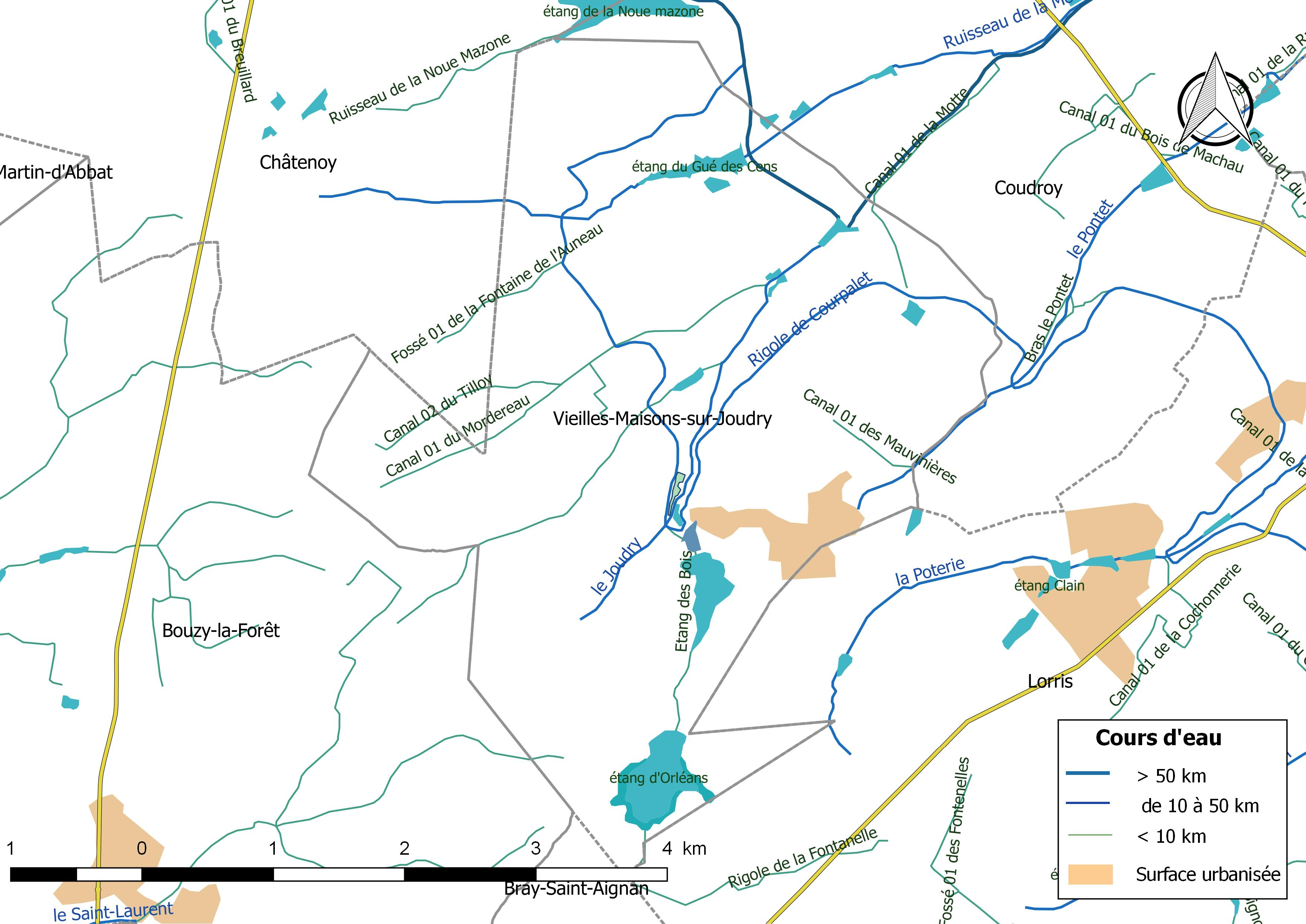 Carte du réseau hydrographique de la commune de Vieilles-Maisons-sur-Joudry (France).